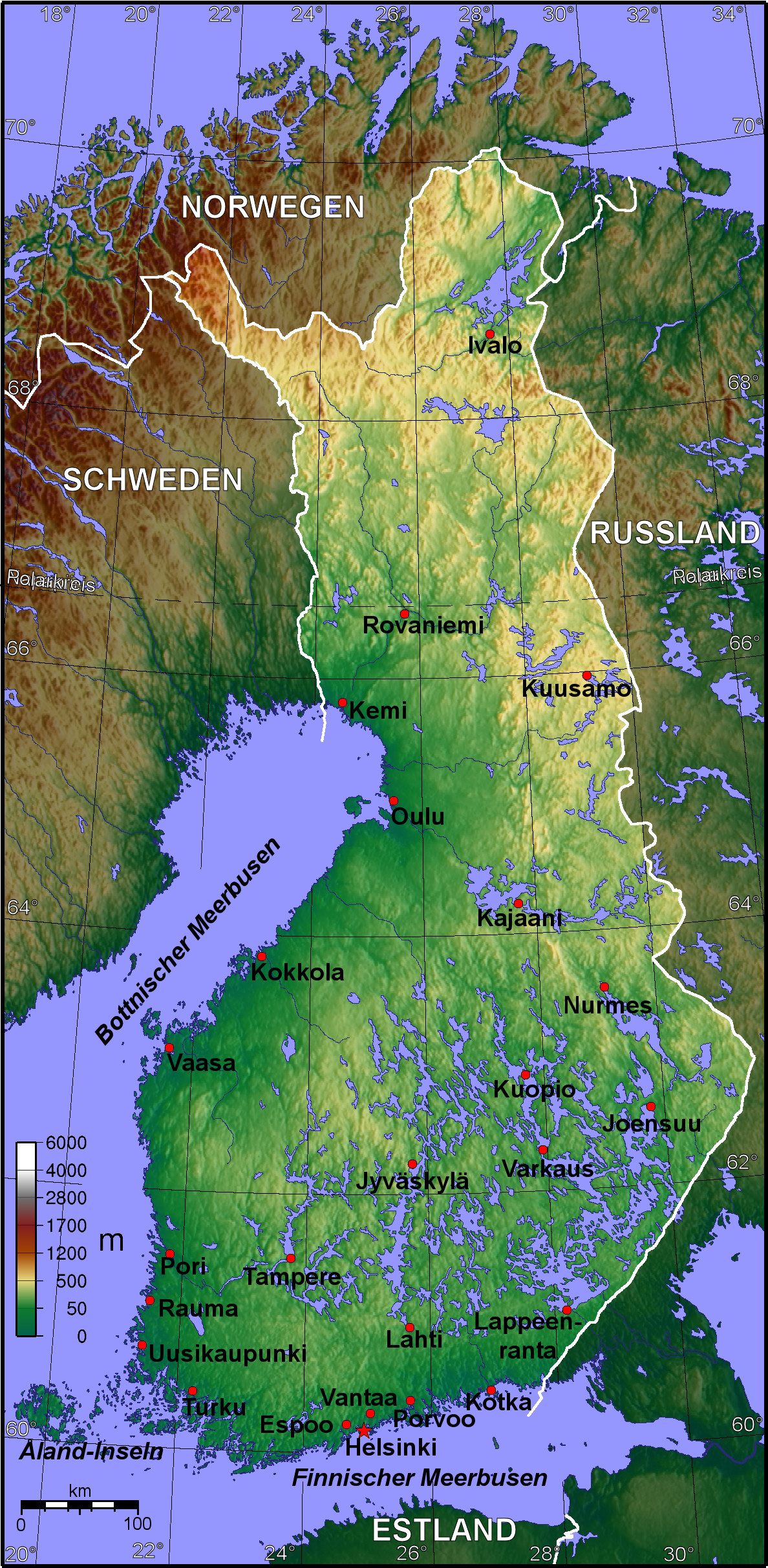 Topografische Karte Finnlands (deutschsprachige Version)